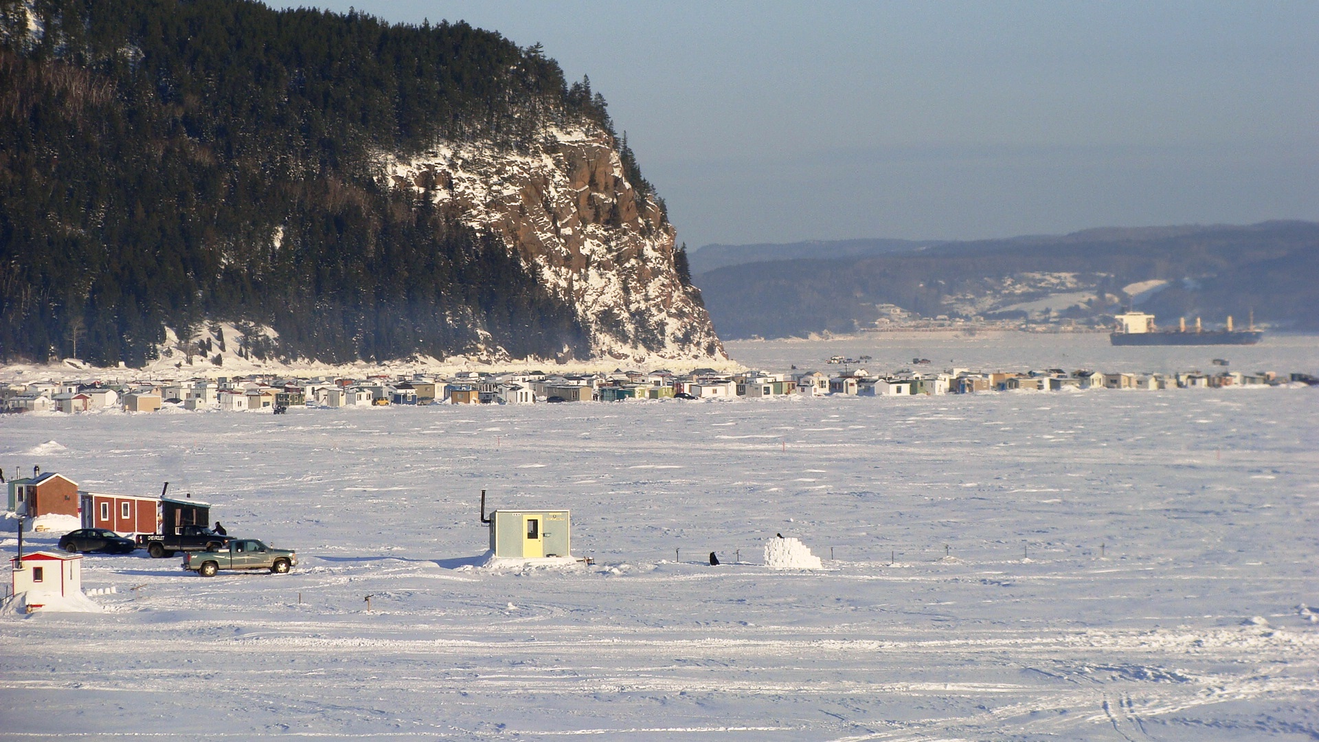 Village sur glace de l'Anse-à-Benjamin, à La Baie (Québec, Canada).